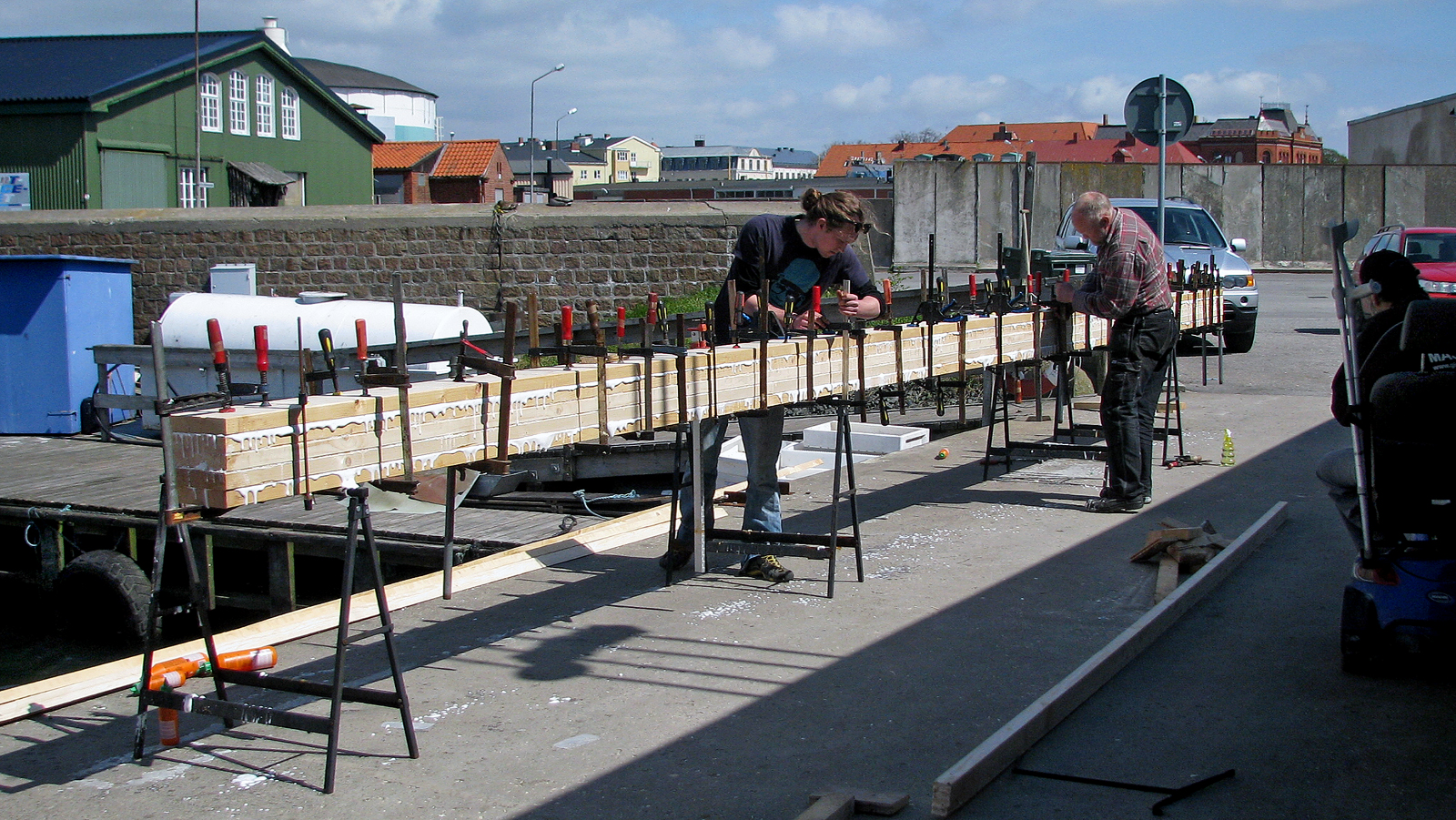 Ca 50 skruvtvingar behövdes för att limma ihop 5 brädor till en mesanmast. Ystads småbåtshamn 2010.